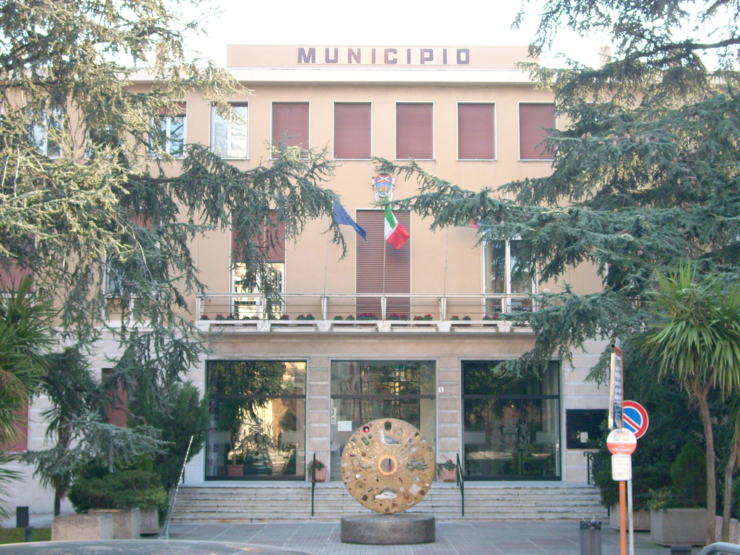 Municipio di Vado Ligure, Liguria, Italy